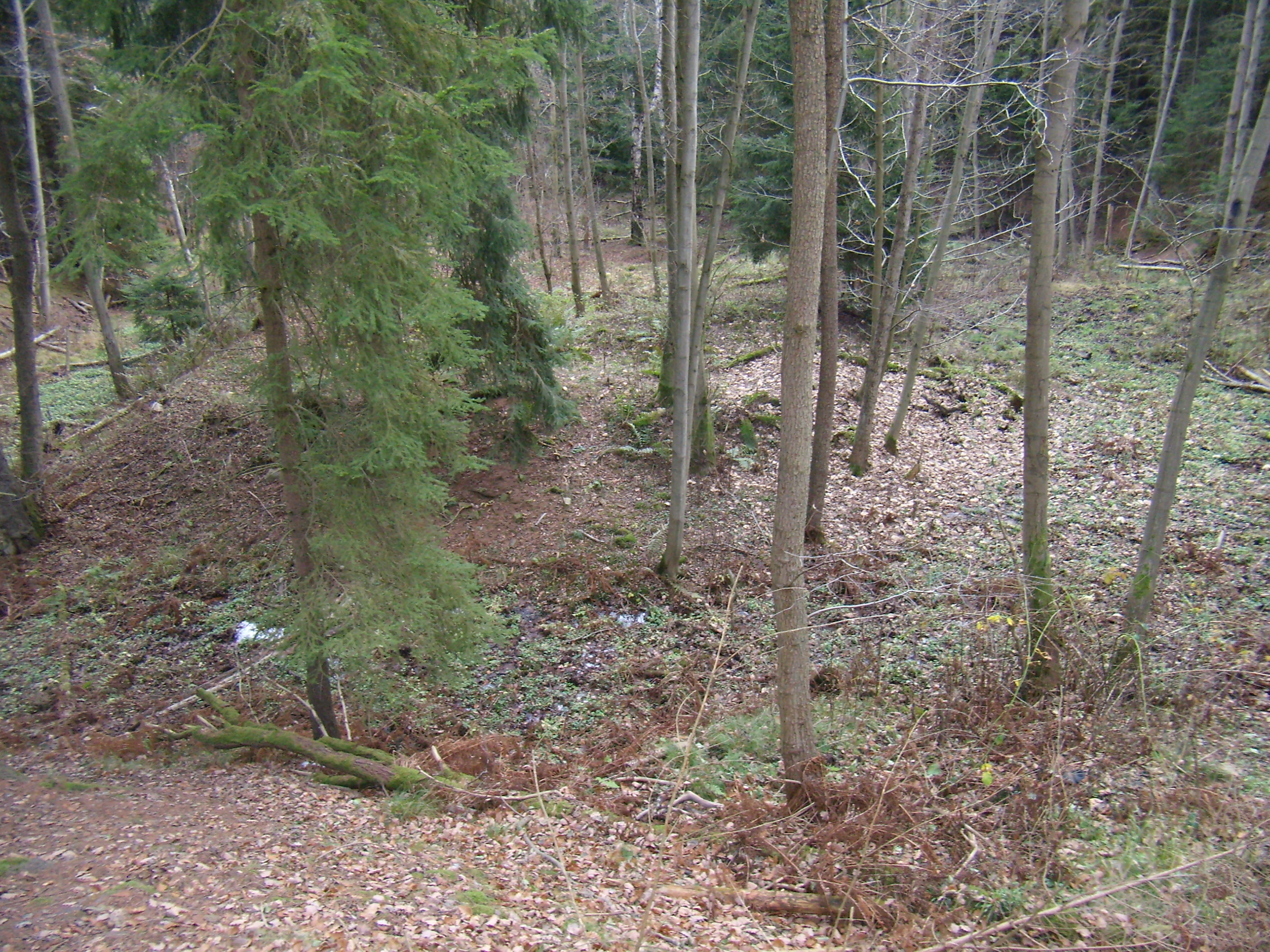 Rovný - tvrziště bývalé vodní tvrz